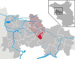 Retzow in Brandenburg (Country) - District Havelland